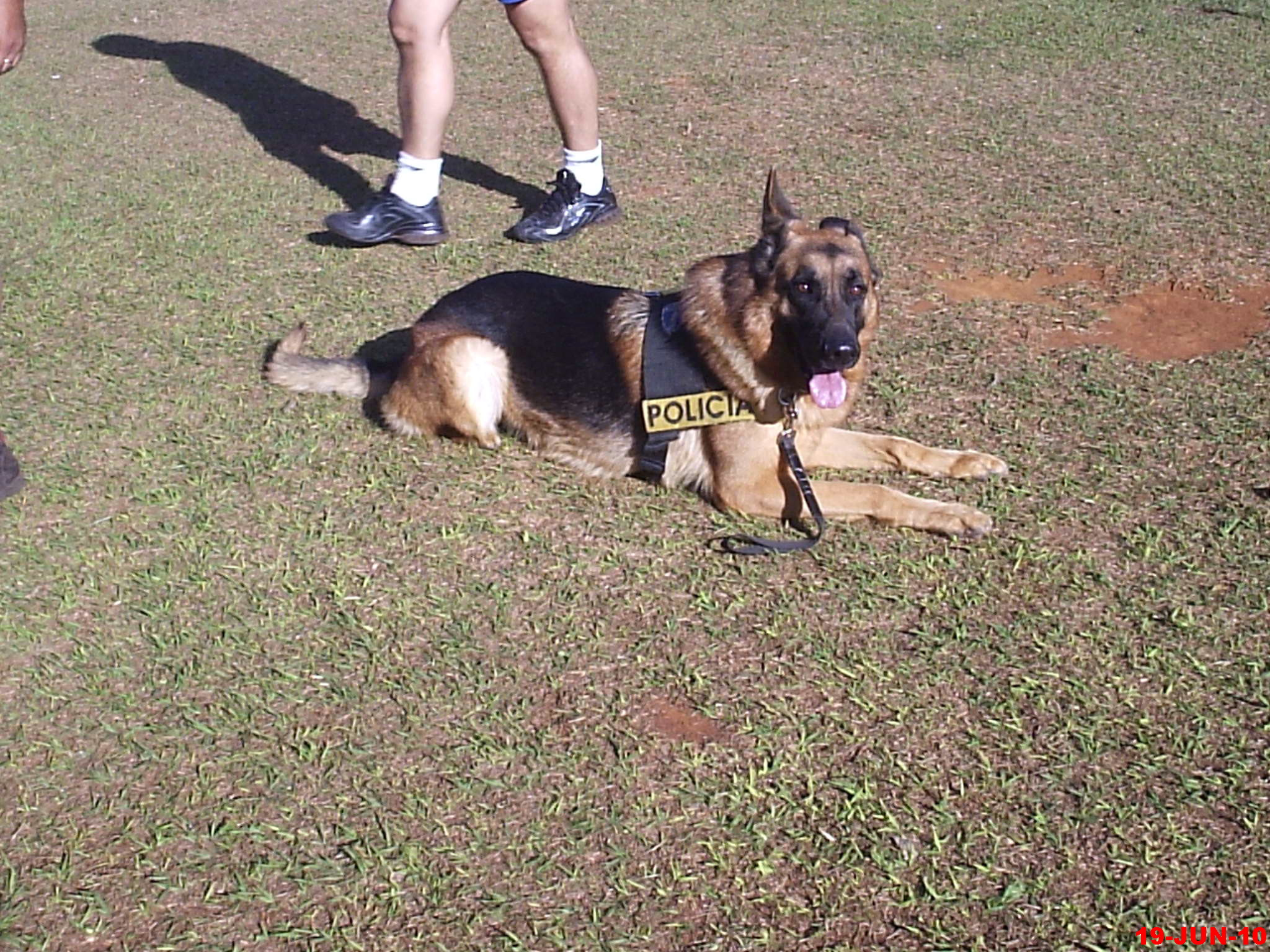 Canil da Polícia Militar de Sertãozinho - 43° BPM/I